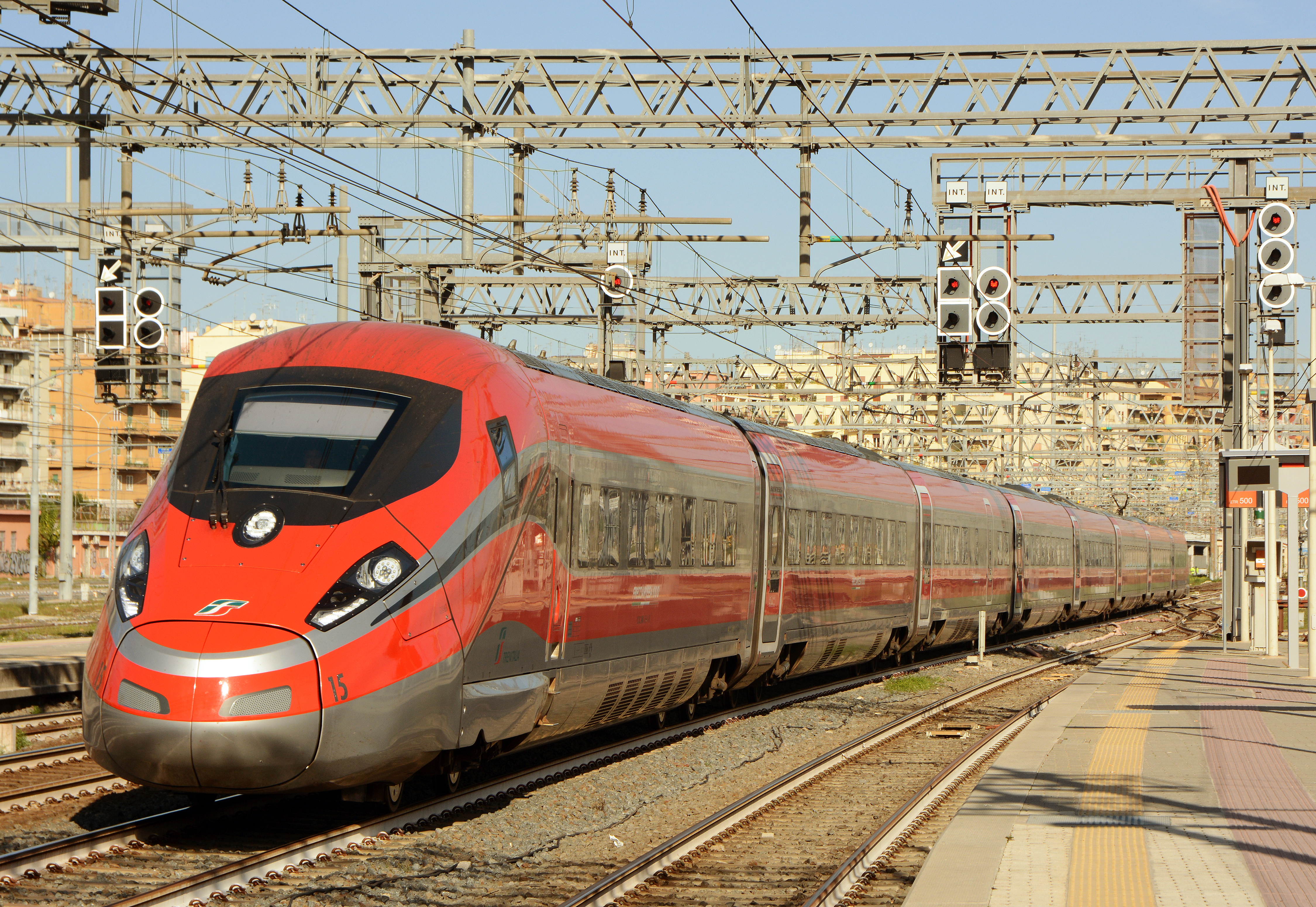 Elettrotreno ETR.400 ("Frecciarossa 1000") delle Ferrovie dello Stato.